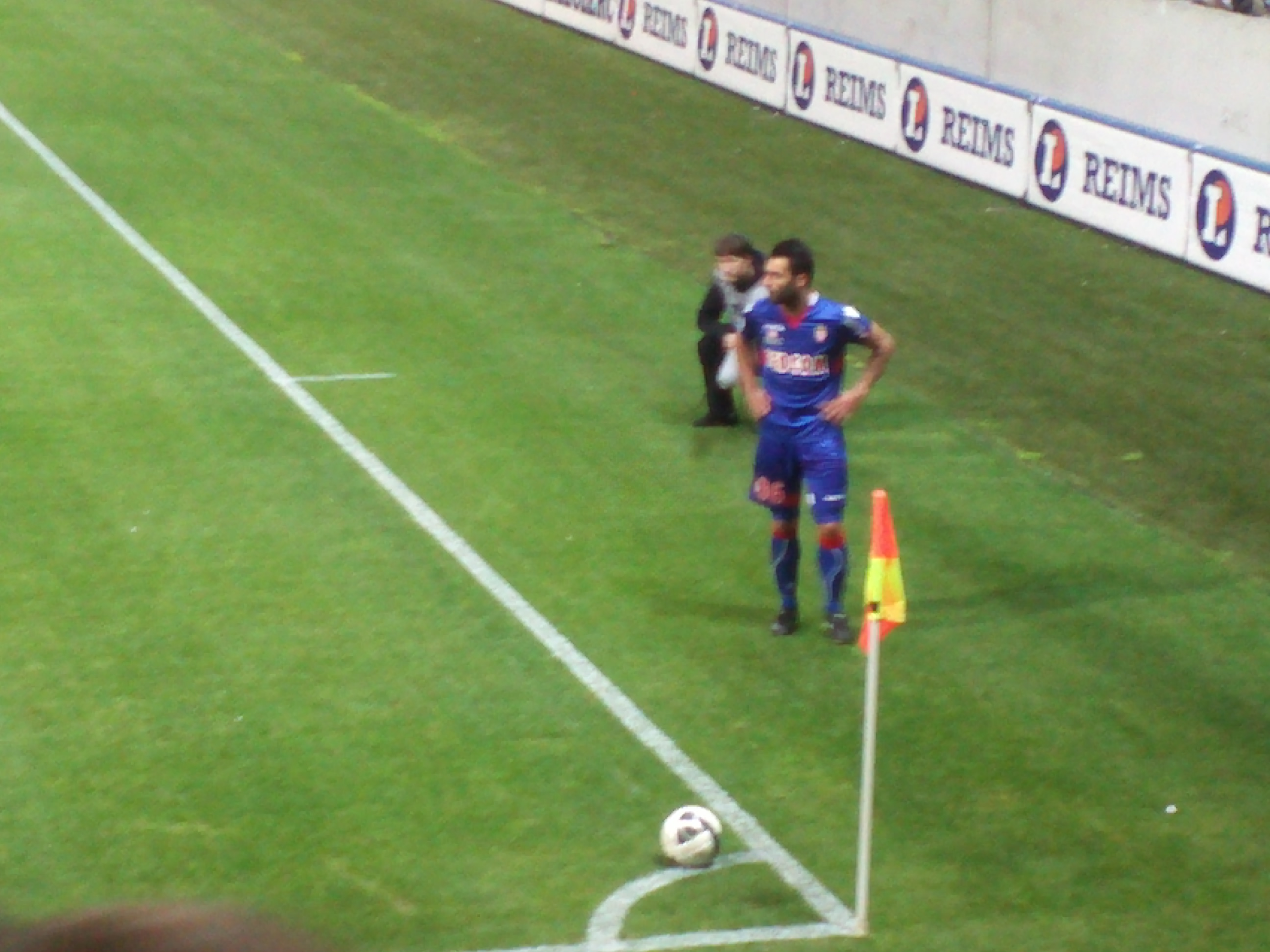 Giorgos Tzavellas s'apprêtant à tirer un corner.